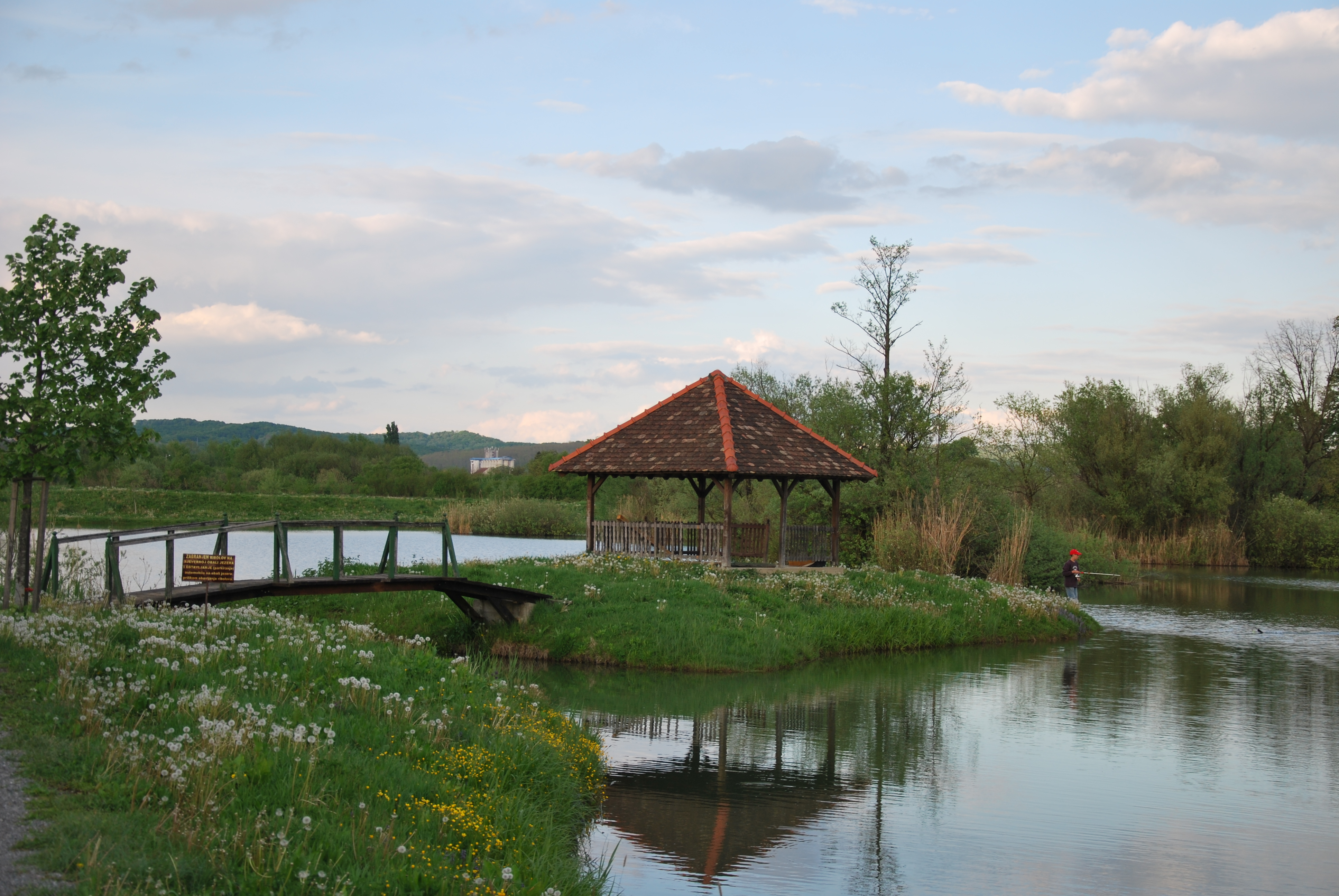 Natürlicher See in der Ortschaft Bročice (Novska) in Slawonien, Kroatien.